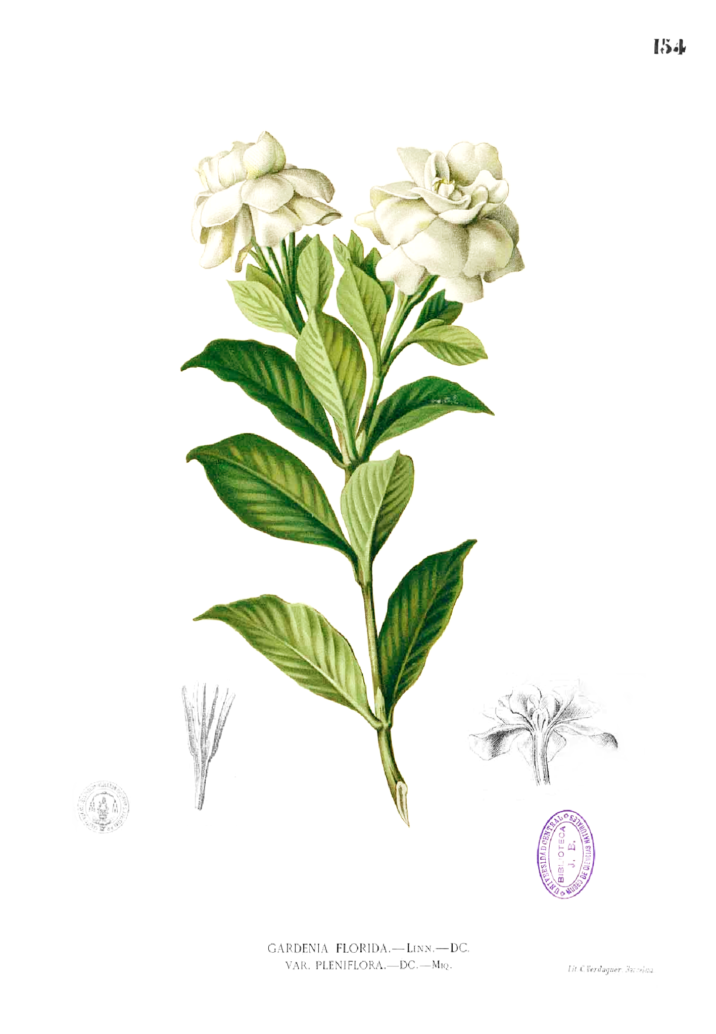 Gardenia jasminoides Plate from book